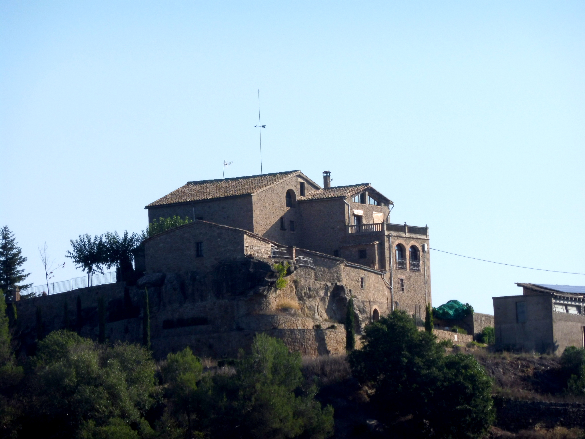 Ballarà (Montmajor), des del camí de Sant Grau